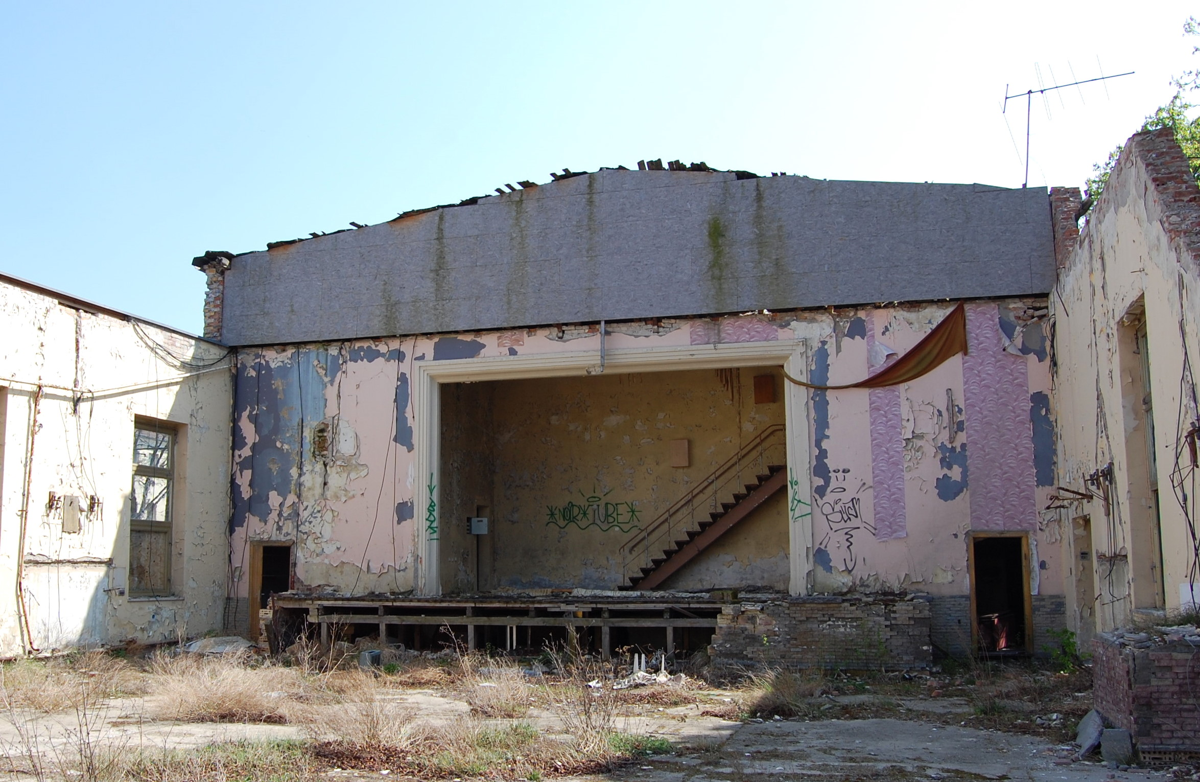 ehemaliger Kultursaal des RAW Salbke